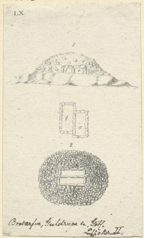 RAÄ-nummer Guldrupe 11:1. Röse med dubbelgrav. Plundrad enligt uppgift. Avbildning i J G Liljegren och C G Brunius Nordiska fornlämningar II, pl LX, troligen från ca 1820. Motiv: Guldrupe 11:1 Kategori: Röse, Litografi RAÄ-nummer Guldrupe 11:1. Röse med dubbelgrav. Plundrad enligt uppgift. Avbildning i J G Liljegren och C G Brunius Nordiska fornlämningar II, pl LX, troligen från ca 1820. Guldrupe 11:1.